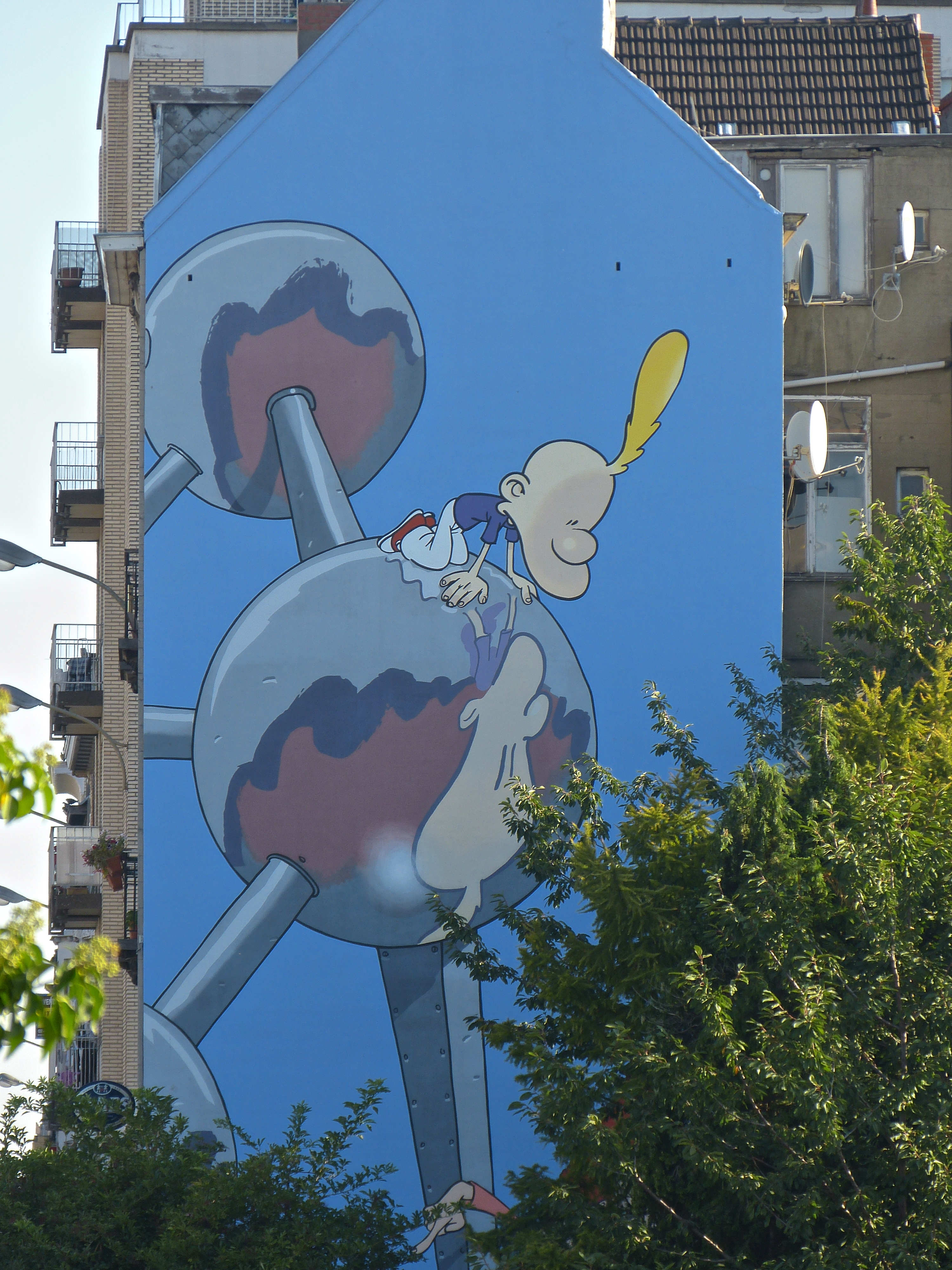 Titeuf. Comicwand in Laeken/Brüssel, Avenue Bockstael (Parcours bande dessinée)[1]